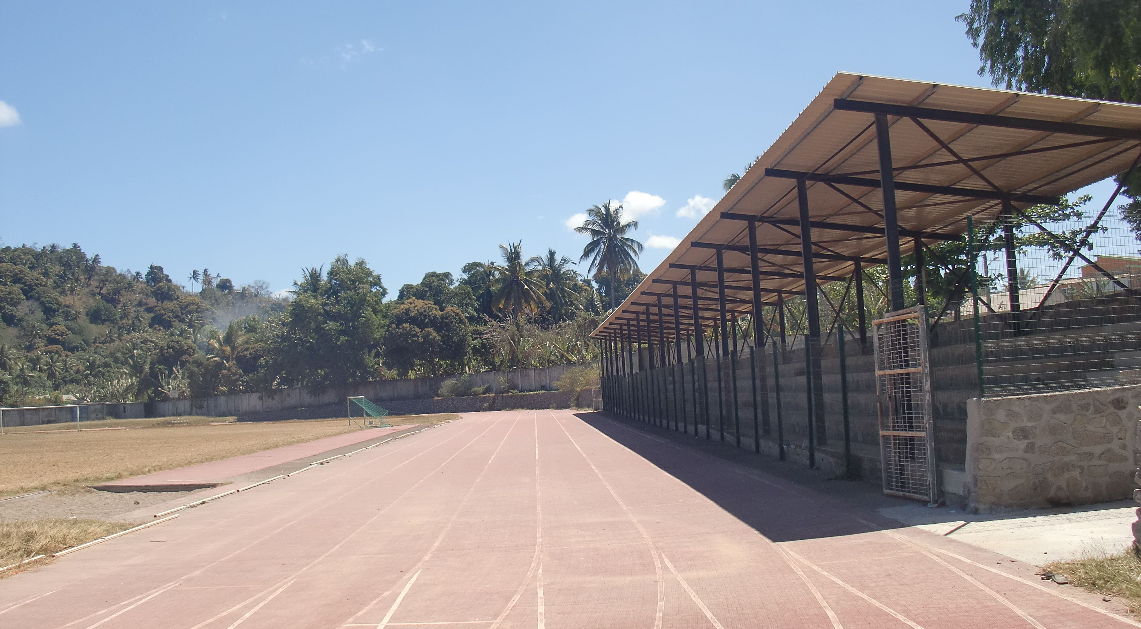 Vue de la piste d'athlétisme du stade de Pamandzi.. A droite les gradins couverts pour les spectateurs.